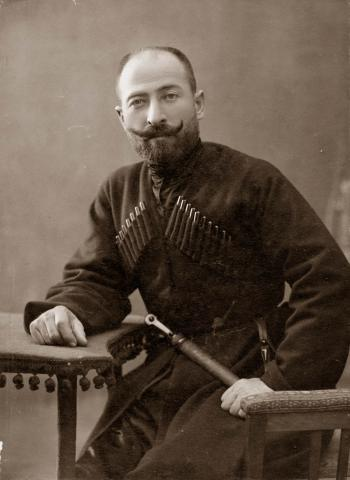 ლოტბარი